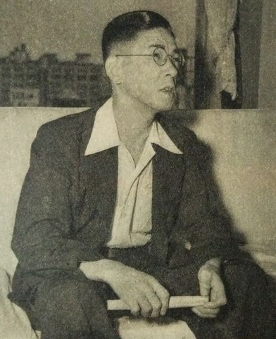 松下力